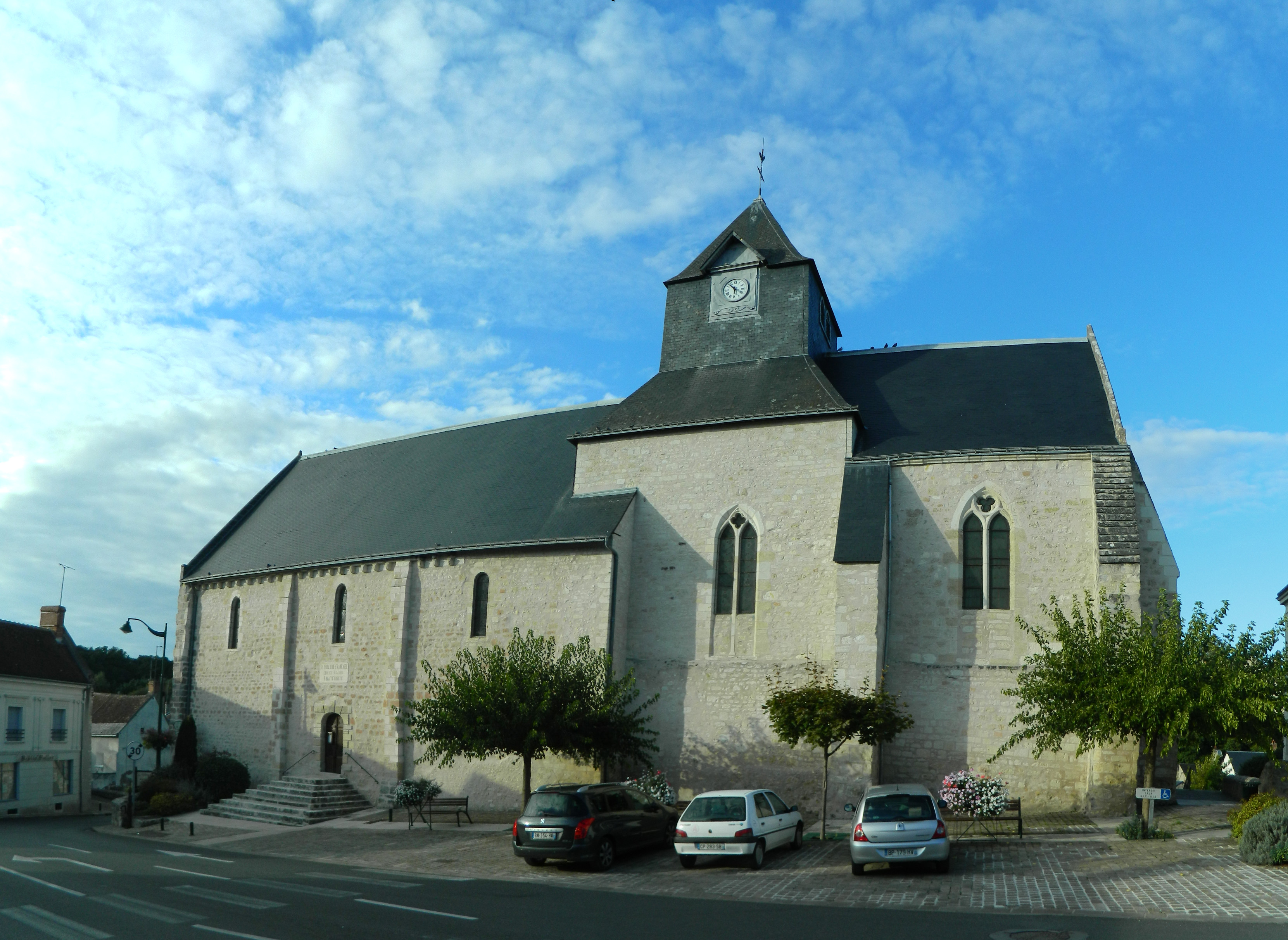 Église Saint-Vincent d'Orbigny .